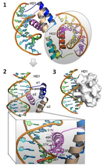 1) Uma ilustração em cartoon 3D do estado dimérico do homeodomínio (HD) de NANOG com fitas de DNA. 2) O modelo monomérico do HD com DNA e a figura extendida abaixo mostra uma vista mais aproximada do resíduos chave de aminoácido em sua interface. 3) A superfície (branco) mapa do HD monomérico nod dá um padrão da interação externa do complexo.